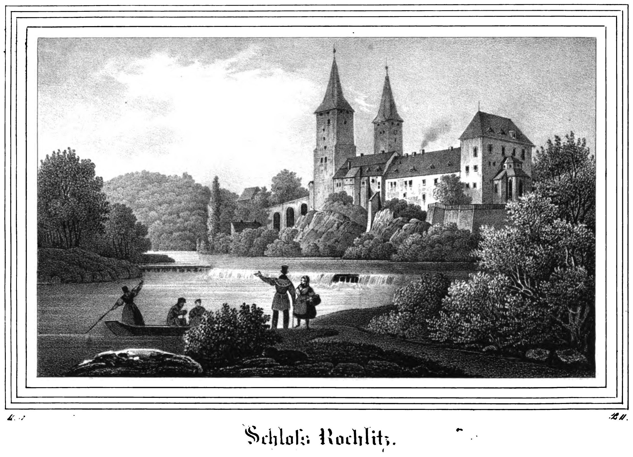 Saxonia Museum für saechsische Vaterlandskunde. Band 2. Dresden: Pietzsch und Comp. Siehe File:Saxonia Museum für saechsische Vaterlandskunde II.djvu